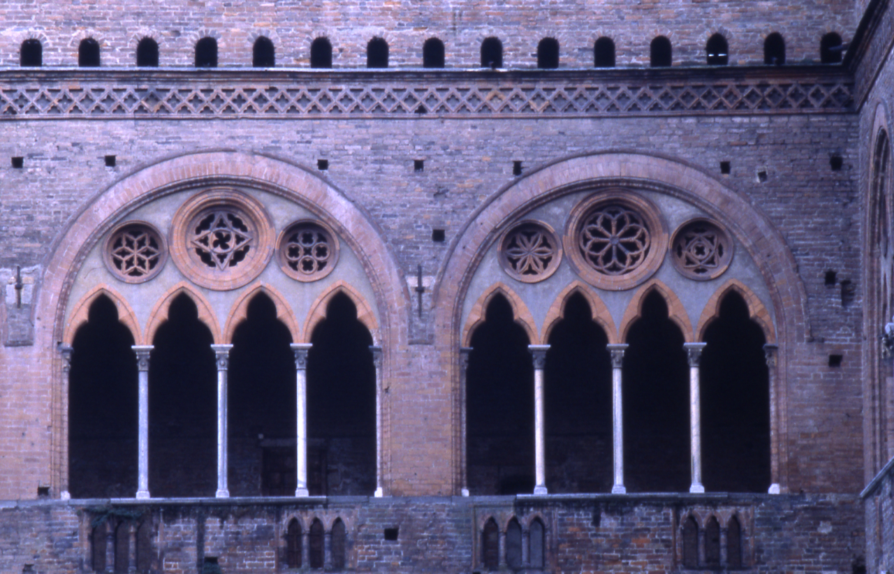 Servizio fotografico : Pavia, 1980 / Paolo Monti. - Foglio: 1, Fotogrammi complessivi: 2/20 : Diapositiva, sviluppo cromogeno/ pellicola ; 35 mm. - ((Nella rubrica denominata "Diapositive 24x36mm" in riferimento ai fogli (inventariati con i nn. 398-407D) in cui sono contenute le diapositive annotazione manoscritta: "Castelli provincia Milano". - Confronti con negativi (b/n - gelatina bromuro d'argento/ pellicola - 35mm). - Occasione: Documentazione per la pubblicazione: Vincenti Antonello, "Castelli viscontei e sforzeschi", Milano, Rusconi immagini, 1981. - Fonte: Rubrica di Paolo Monti: Diapositive 24x36mm (1948-1982), presso Archivio Paolo Monti. Rubrica con elenco soggetti e numeri di inventario (da 1 a 1000) corrispondenti ai fogli a tasche in pvc in cui sono contenute le diapositive. - Fonte: Monografia di Vincenti, Antonello: Castelli viscontei e sforzeschi, Milano, Rusconi immagini (1981)